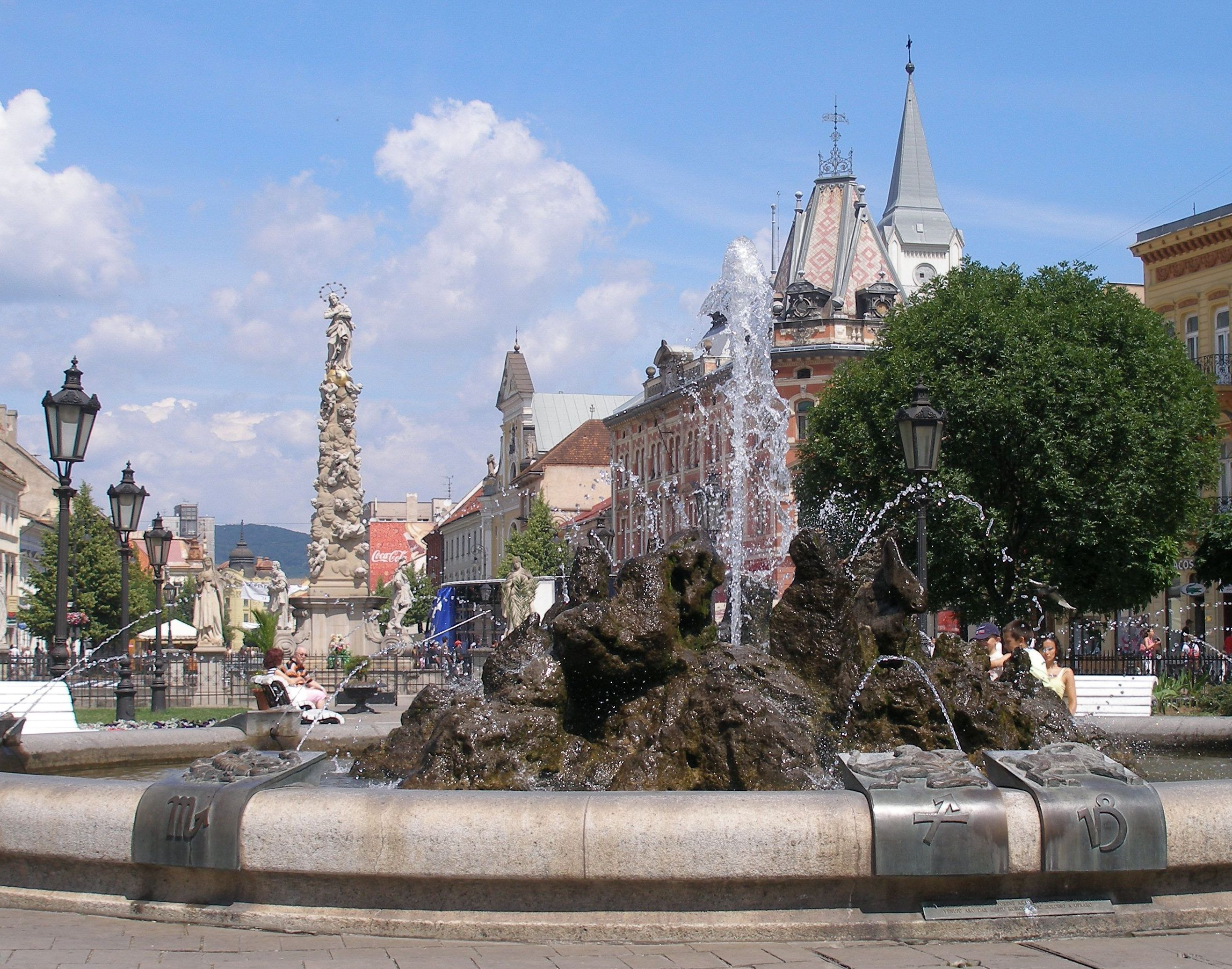 Centrum mesta Košice